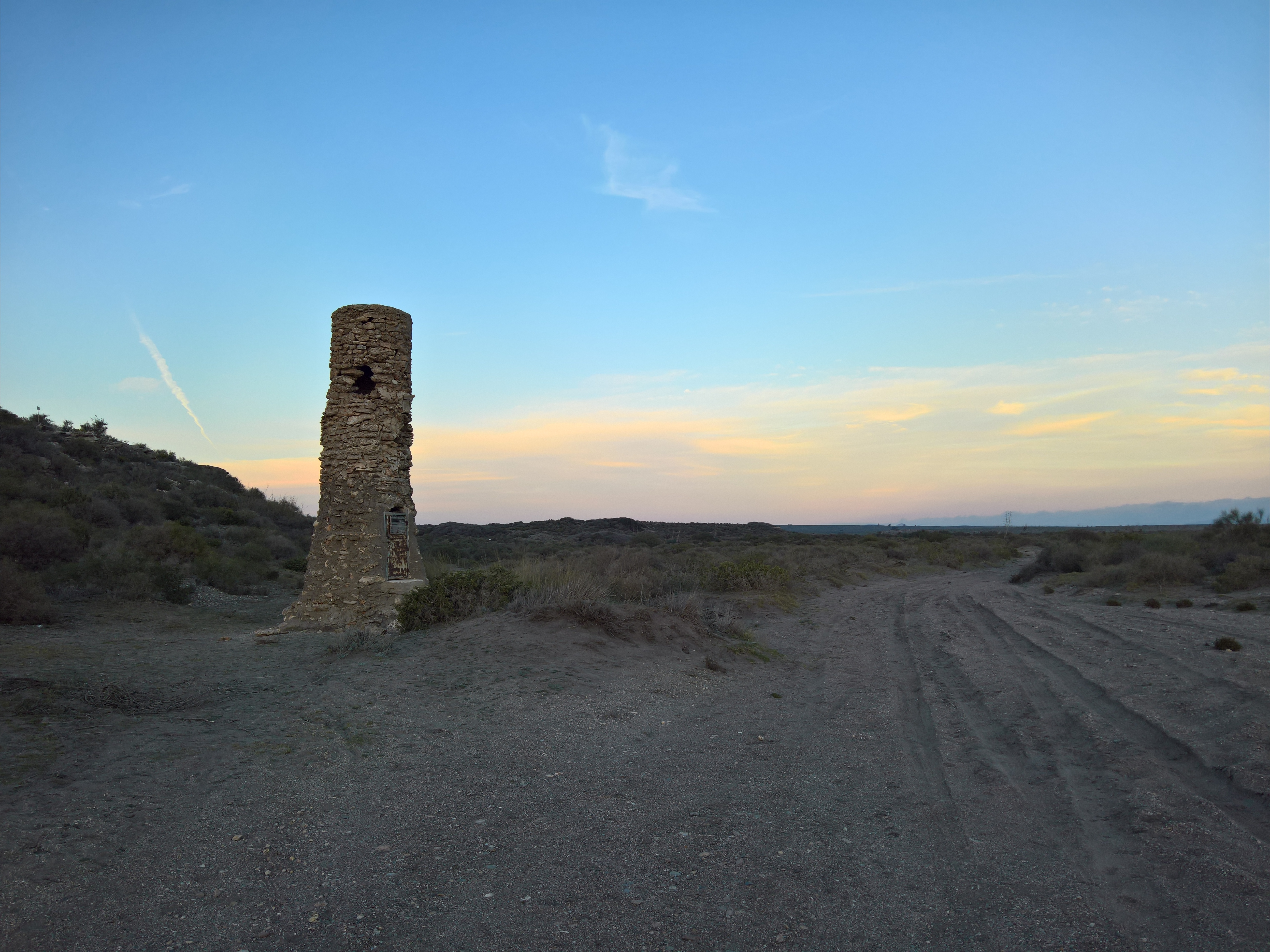 Pozo de las Amoladeras